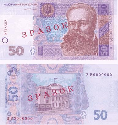 50-Hrywnja-Schein, 2004